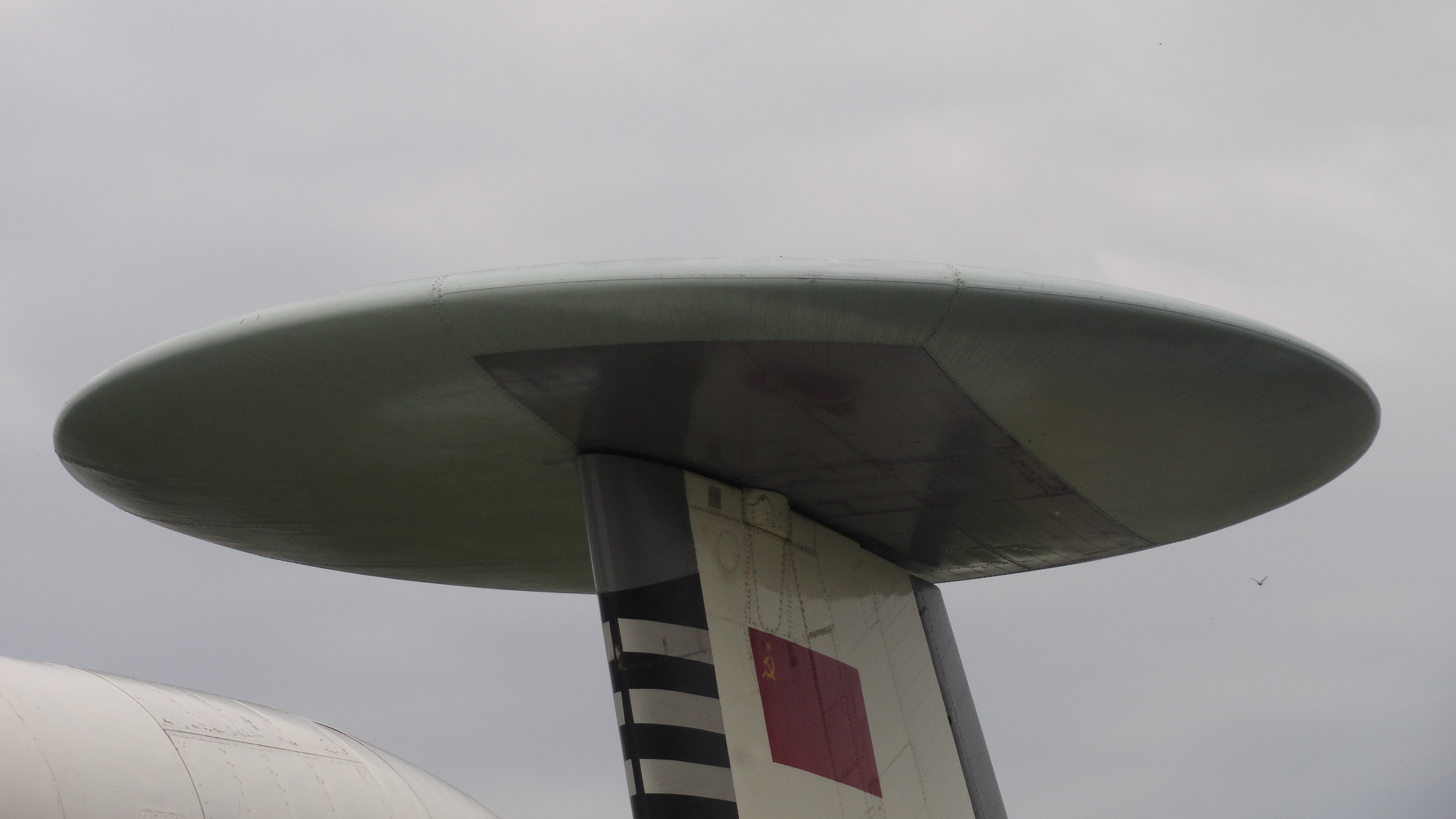 Отекатель антенны РЛС на хвостовом оперении самолёта Ан-71. Государственный музей авиации г. Киев.